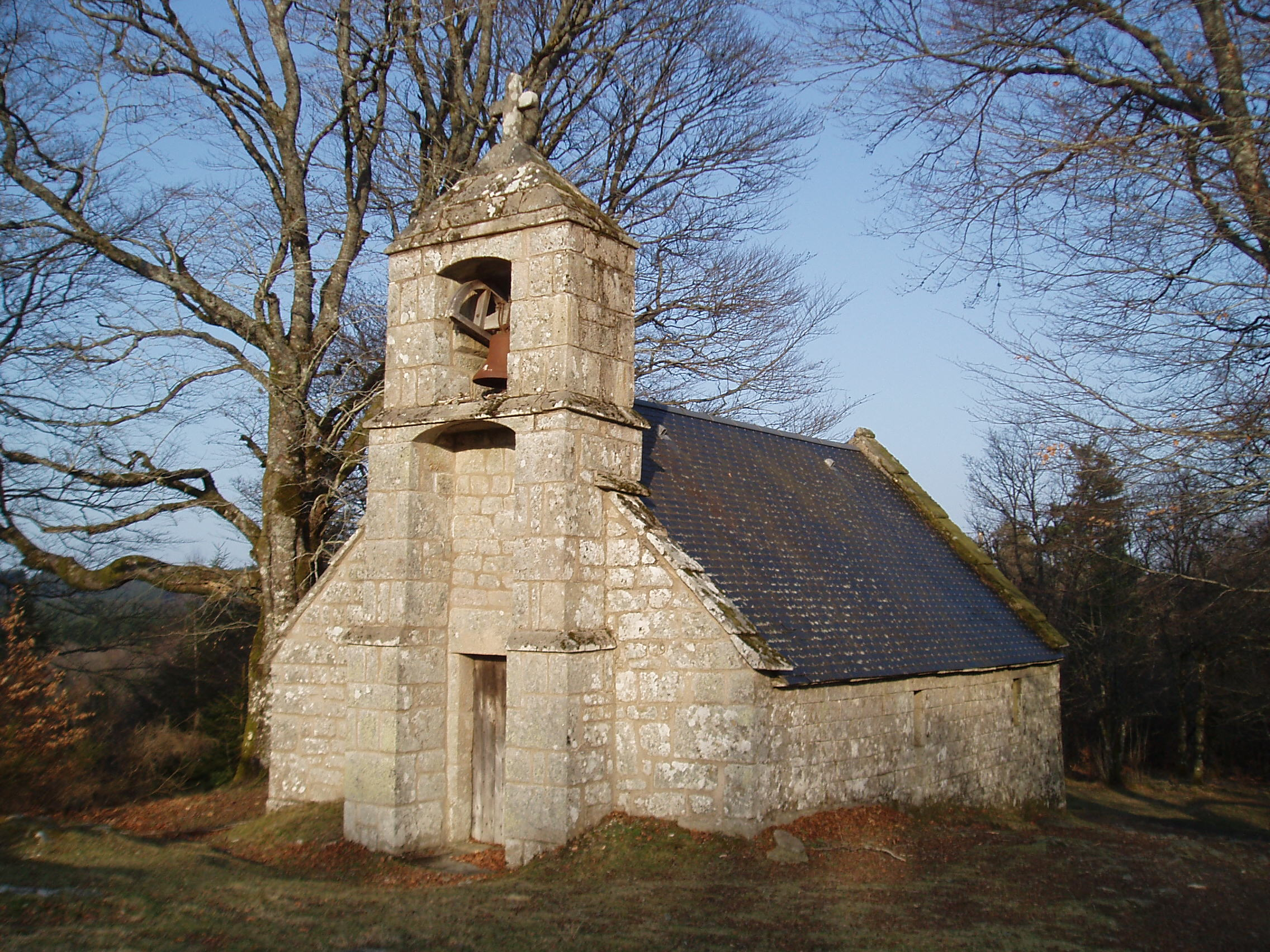 chapelle